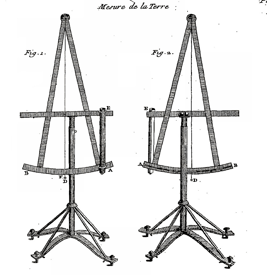 Un des secteurs de J. Cassini, employé au sud, sur la méridienne de l'Observatoire de Paris ; verification par retournement.